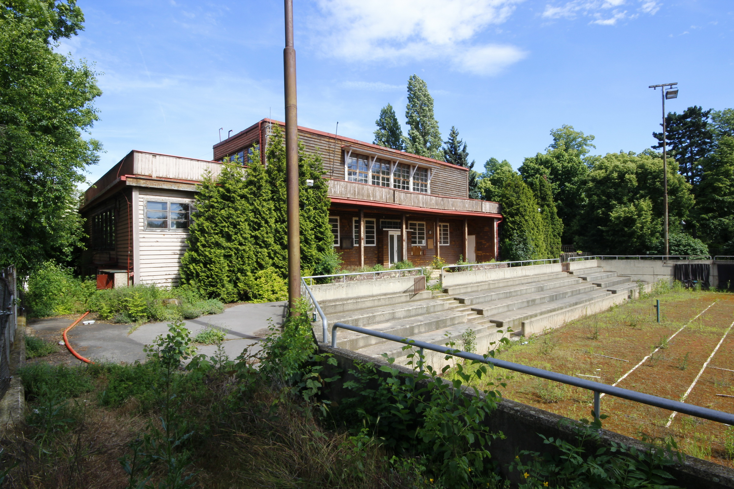 Bohumír Kozák: Klubovna LTC Praha, 1926